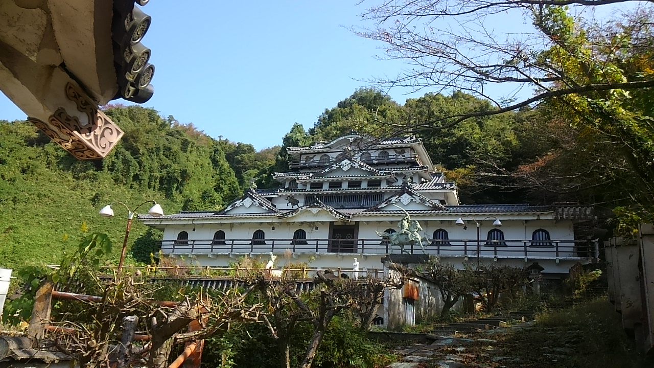 遊園内の佐和山城